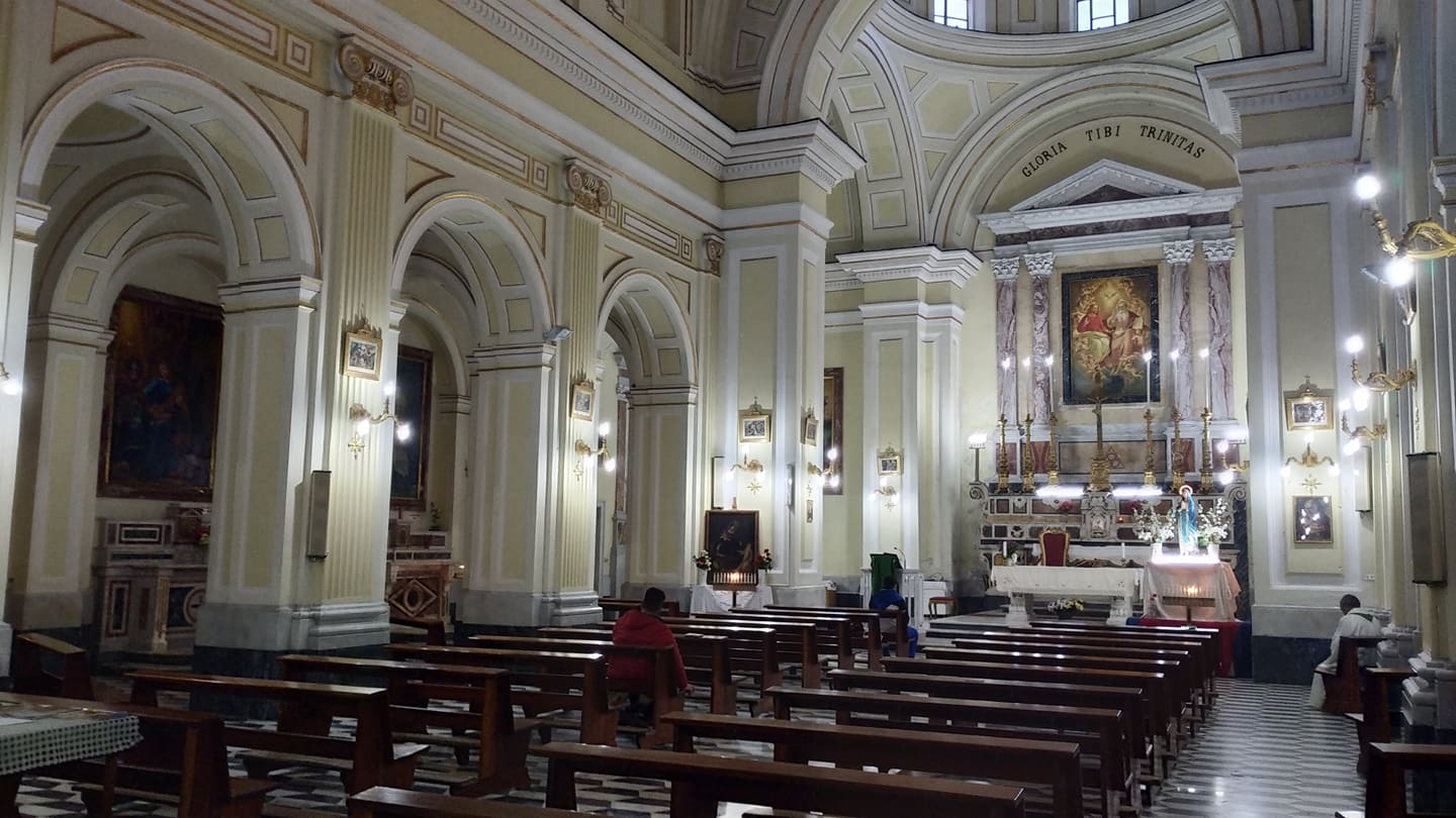 Interno Trinità degli Spagnoli